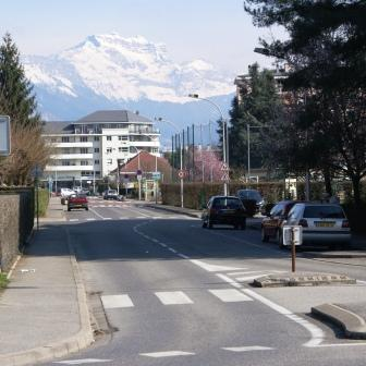 Rue des grillons